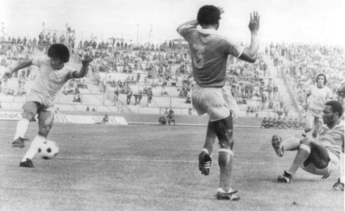 ADN-ZB-AP-Tele-22.6.74-ma-BRD-Gelsenkirchen: X. Fußball-Weltmeisterschaft-1. Finalrunde, Gruppe 2: Zaire - Brasilien 0:3- Durch Jairzinho (links) erzielte Brasilien sein erstes diesjähriges WM-Tor. Bildmitte (Nr.3) Mwanza Mukombo und rechts am Boden Mafu Kibonge (beide Zaire).